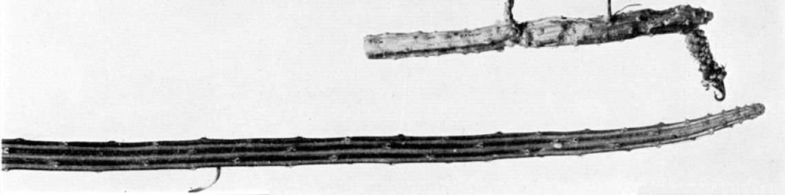 Selenicereus murrillii (Hylocereeae; Cactaceae; Planta) Nathaniel Lord Britton és Joseph Nelson Rose "The Cactaceae" c. könyvéből